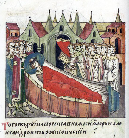 ЛИЦЕВОЙ ЛЕТОПИСНЫЙ СВОД В том же году преставился князь Юрий Александрович Ростовский.